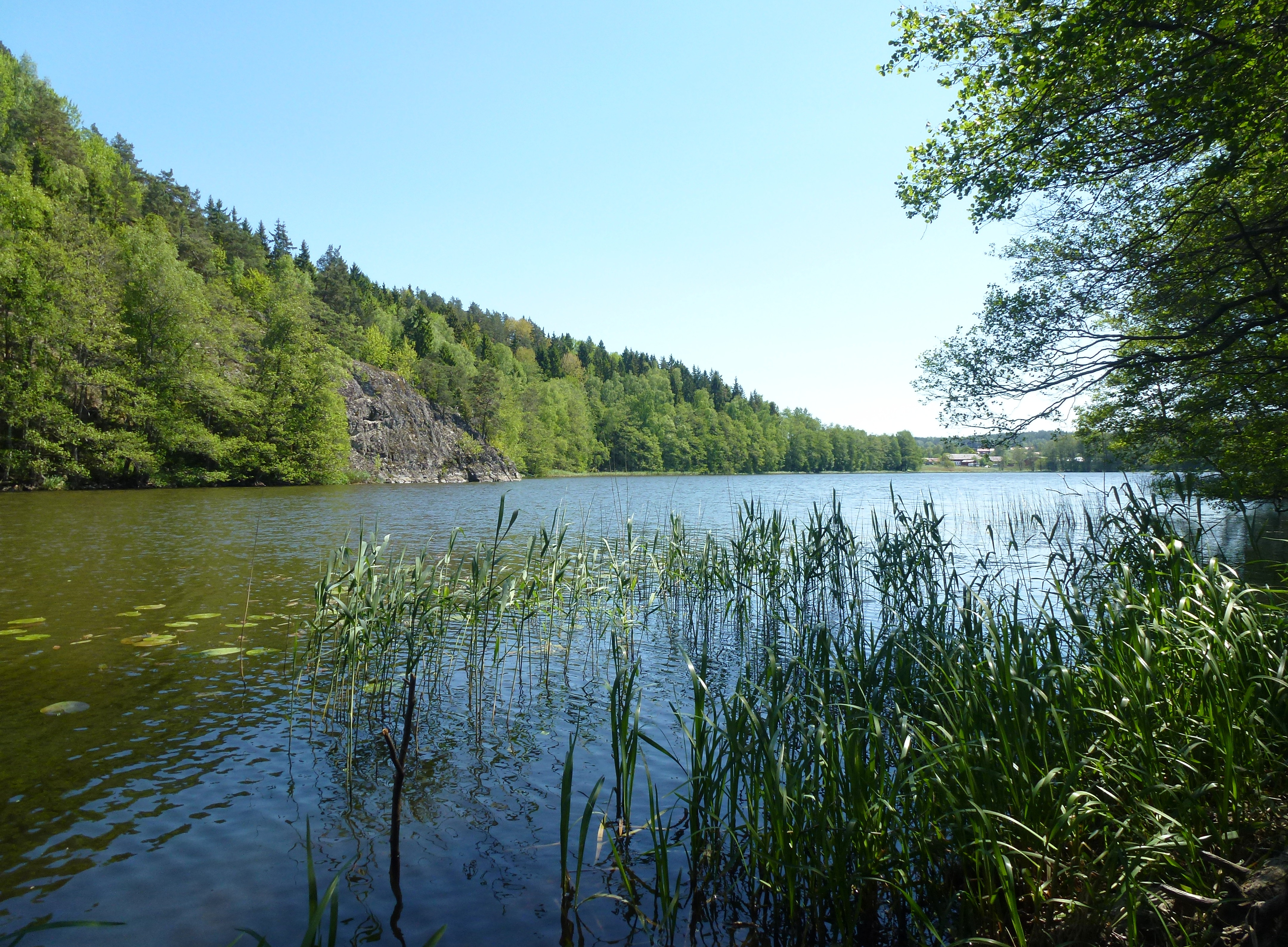 Sjön Axaren i Botkyrka kommun, vy mot syd